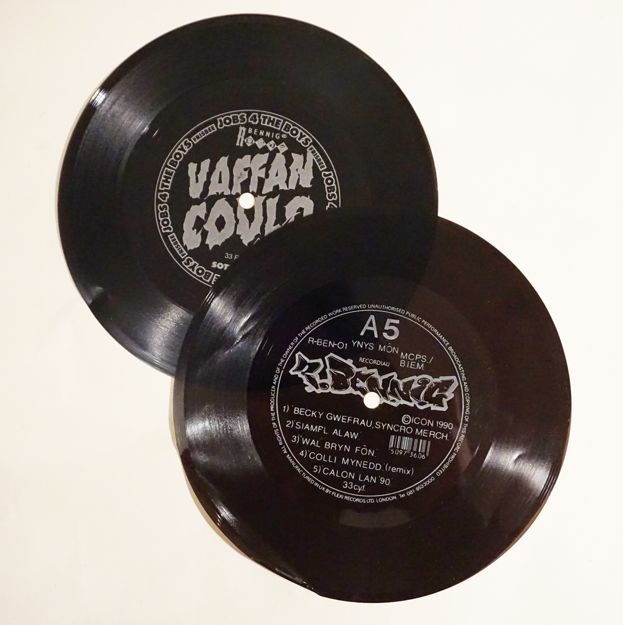 Ffotogfraff o ddisgiau fflecsi label recordio R-Bennig